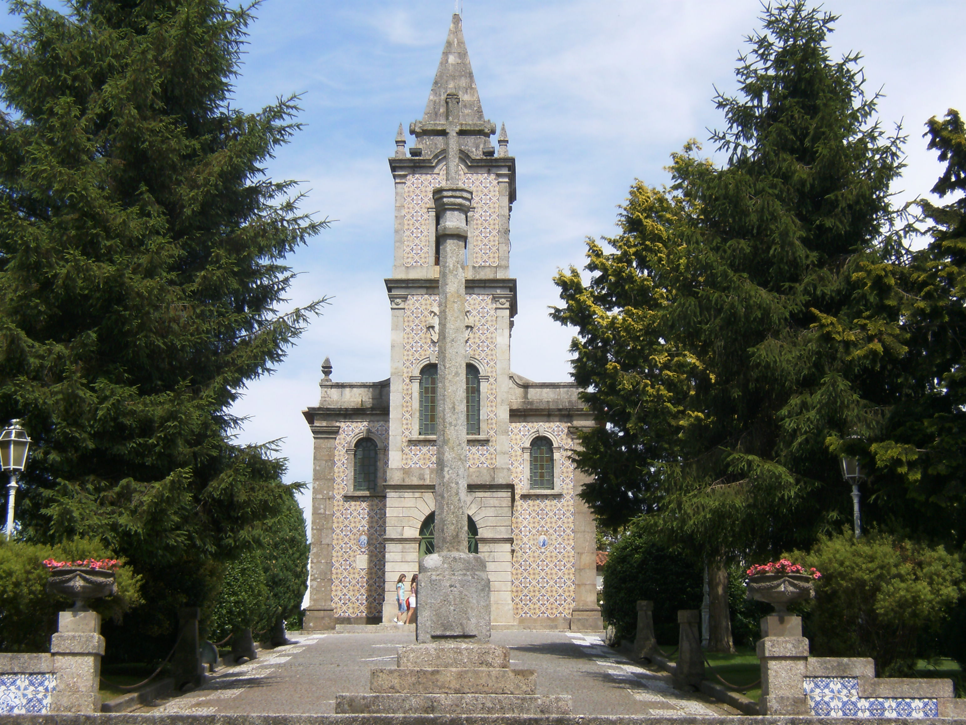 Igreja Matriz de Paços de Ferreira